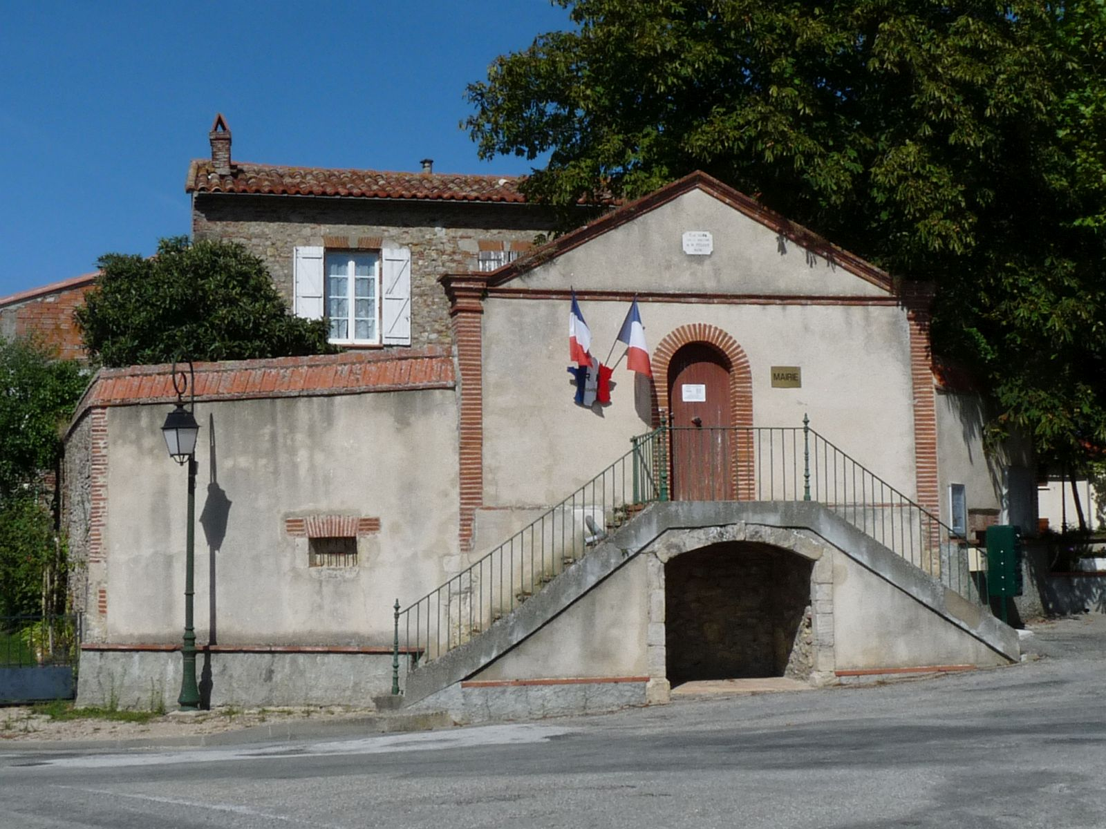 Mairie de Lagarde, Haute-Garonne, France